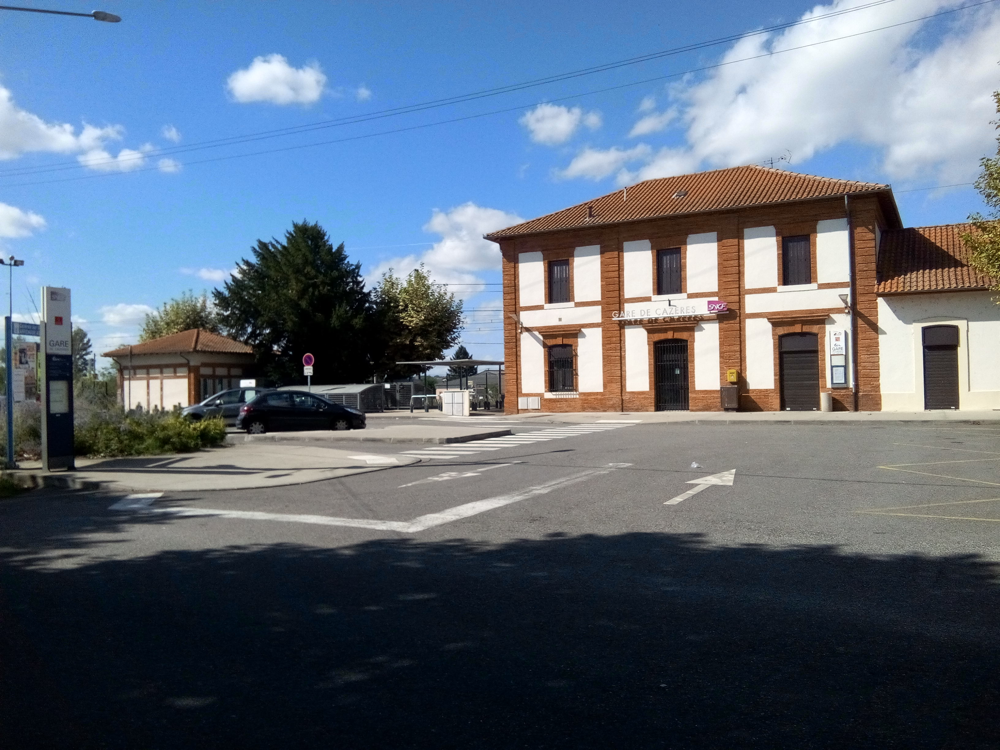 Gare de Cazères